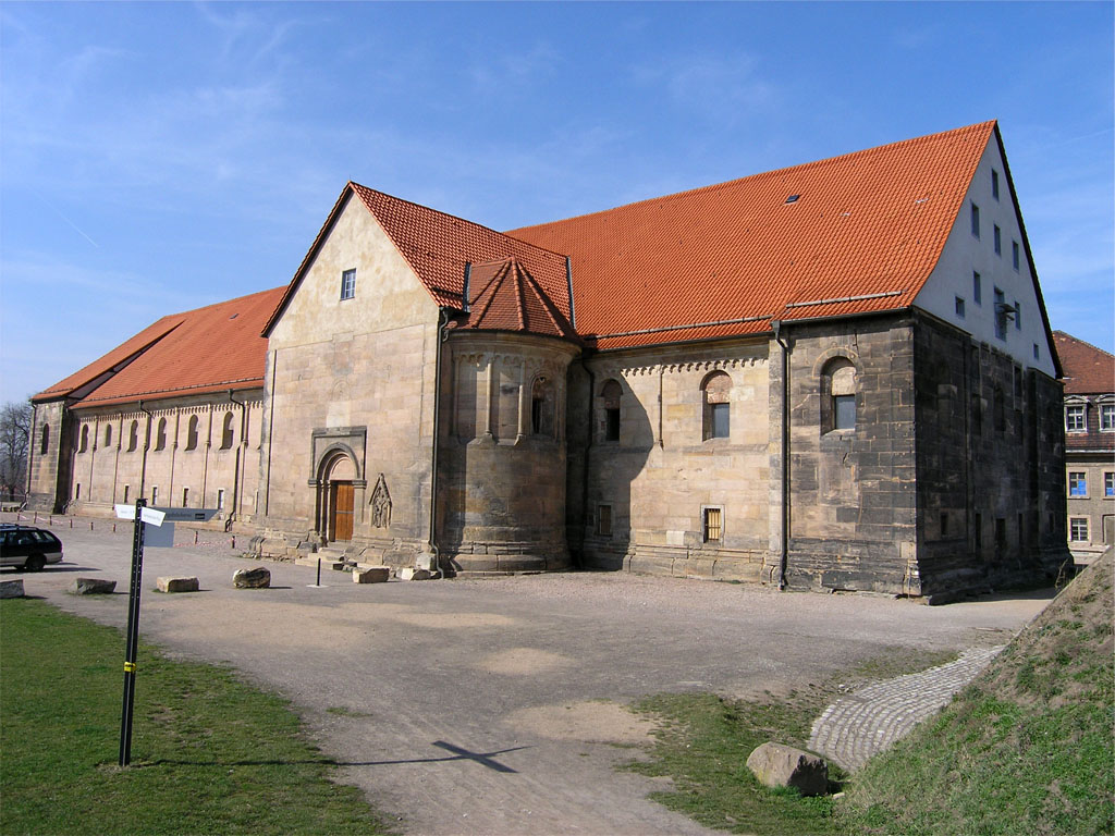 Südseite der Peterskirche (errichtet zwischen 1103 und 1147) in der Zitadelle Petersberg in Erfurt